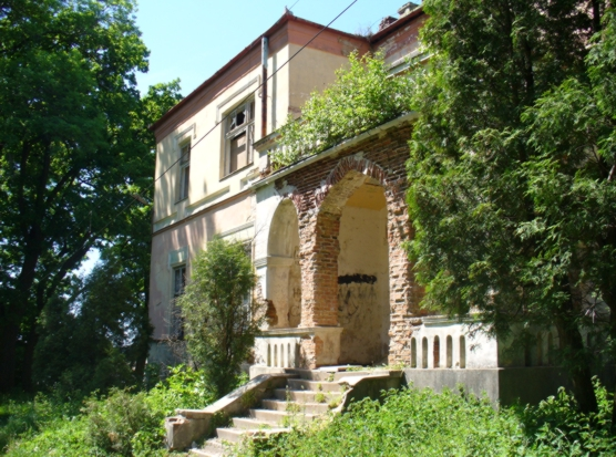 Cianowice, dworek